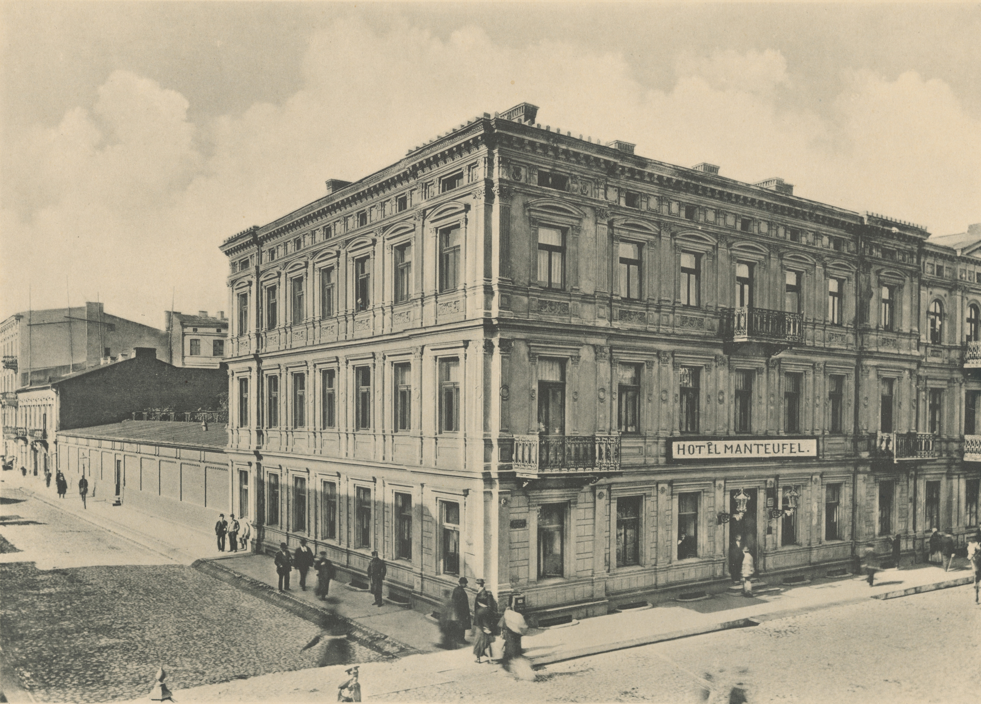 Fotografia przedstawia budynek hotelu i restauracji Manteufel znajdujący się przy ulicy Zachodniej 45 (obecnie jest to numer 81/83). Budynek został zbudowany w 1879 roku według projektu Hilarego Majewskiego przez Adolfa Manteuffela, który pochodził ze spolonizowanego rodu grafów niemieckich. Dla urozmaicenia pobytu gości w hotelu dostępne były fontanna, ogród letni oraz scena teatralna. W 1885 roku hotel został sprzedany Józefowi i Romanowi Petrykowskim, którzy pozostali jego właścicielami aż do wybuchu II wojny światowej. Po jej zakończeniu budynek przejęła Akademia Medyczna. W latach 1954-1989 działał w nim Studencki Teatr Satyry "Cytryna", następnie w latach 1997-2009 w dawnej kawiarni hotelowej funkcjonowało kino "Cytryna". W 2012 roku w budynku uruchomiono klub muzyczny Scenografia. Fotografia pochodzi z wydanego w 1896 roku albumu Bronisława Wilkoszewskiego „Widoki m. Łodzi”. Saryusz Bronisław Paweł Wilkoszewski (1847-1901), zwany "łódzkim Canaletto" był mistrzem fotografii ilustracyjnej. Udokumentował zabudowę Łodzi z końca XIX wieku przede wszystkim wille, fabryki, budynki użyteczności publicznej, obiekty sakralne, ulicę Piotrkowską. Jego zakład fotograficzny znajdował się w willi "Trianon" w Pasażu Meyera 5 (obecnie ulica Moniuszki).